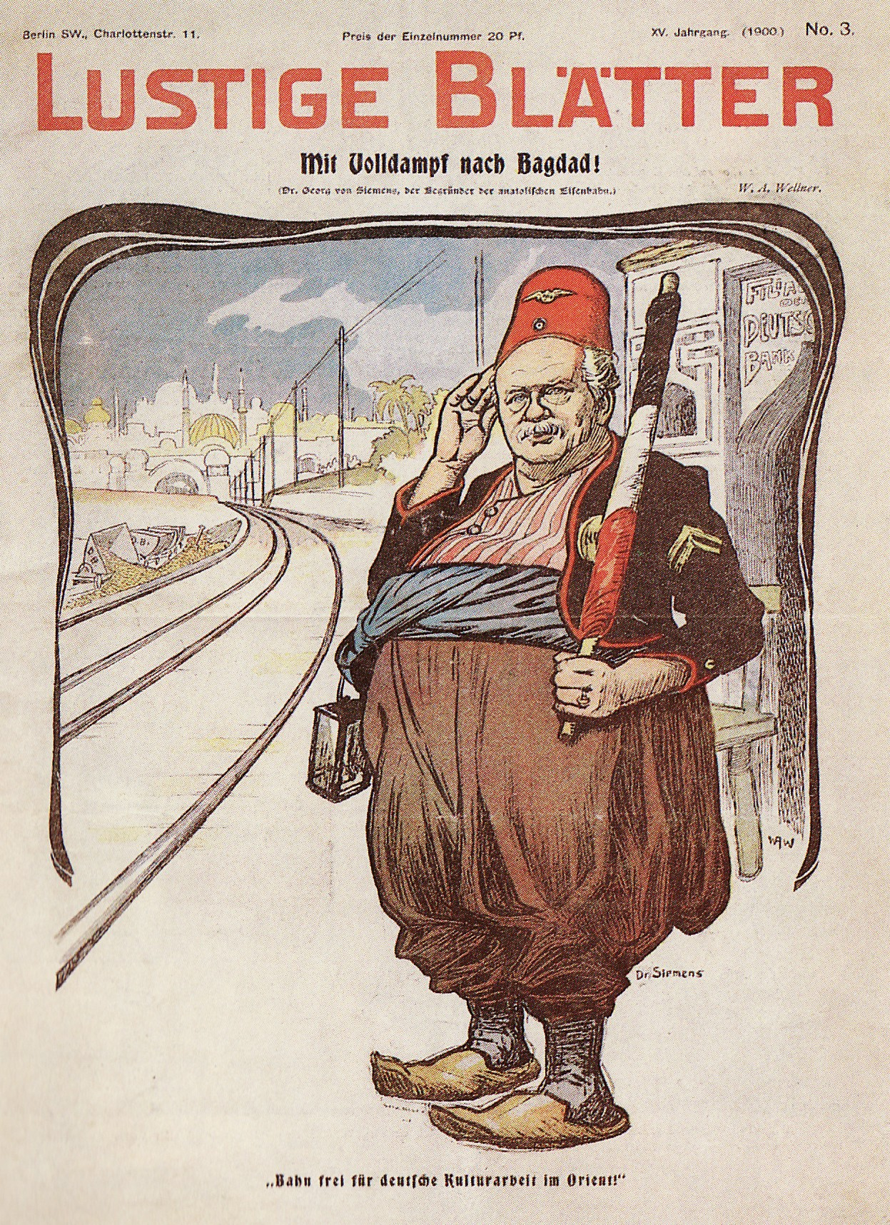 Georg von Siemens - Caricatura